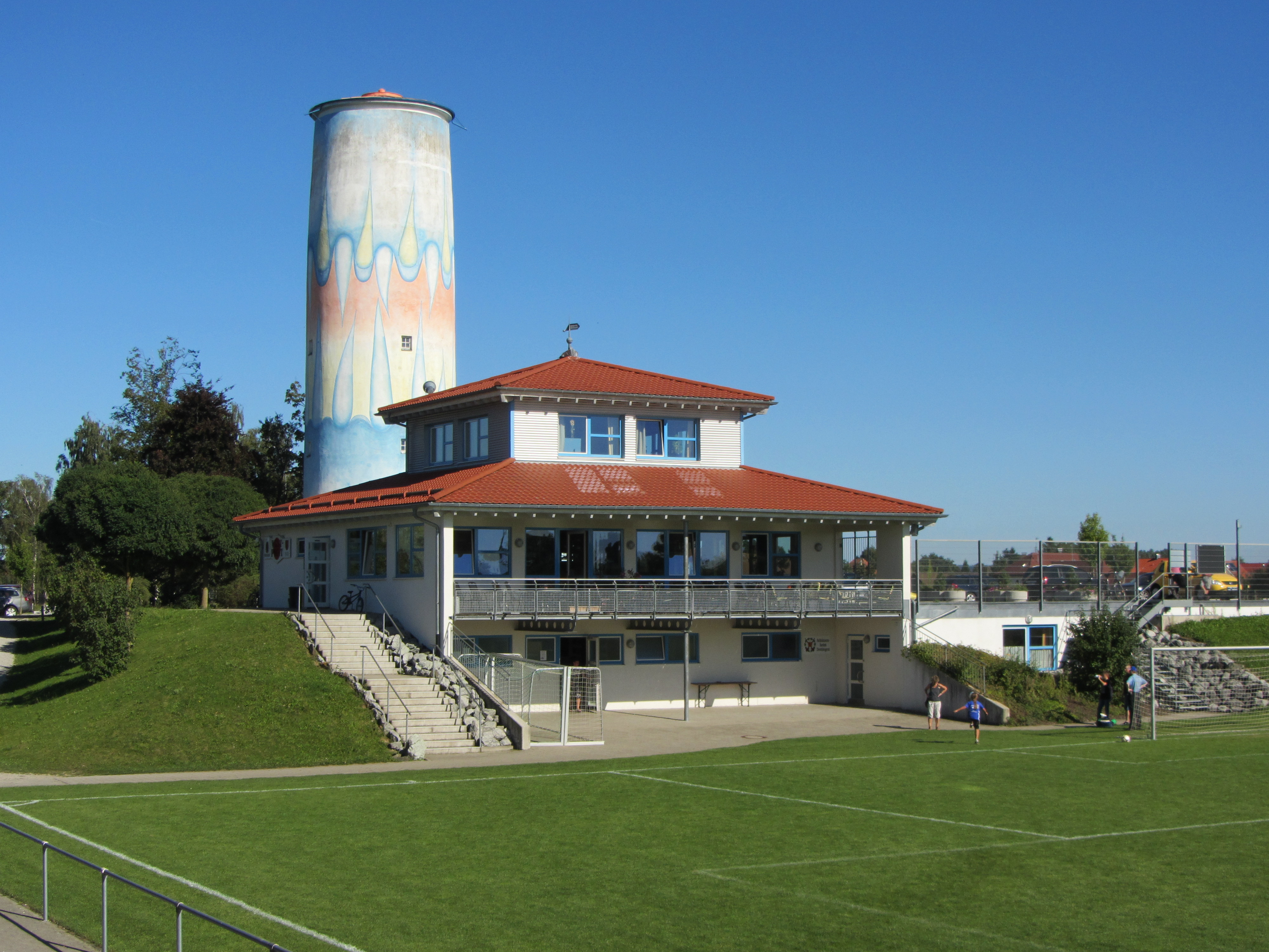 Sportgelände SV Dettingen an der Iller - Gastronomie oben unten Schützenheim SV Dettingen